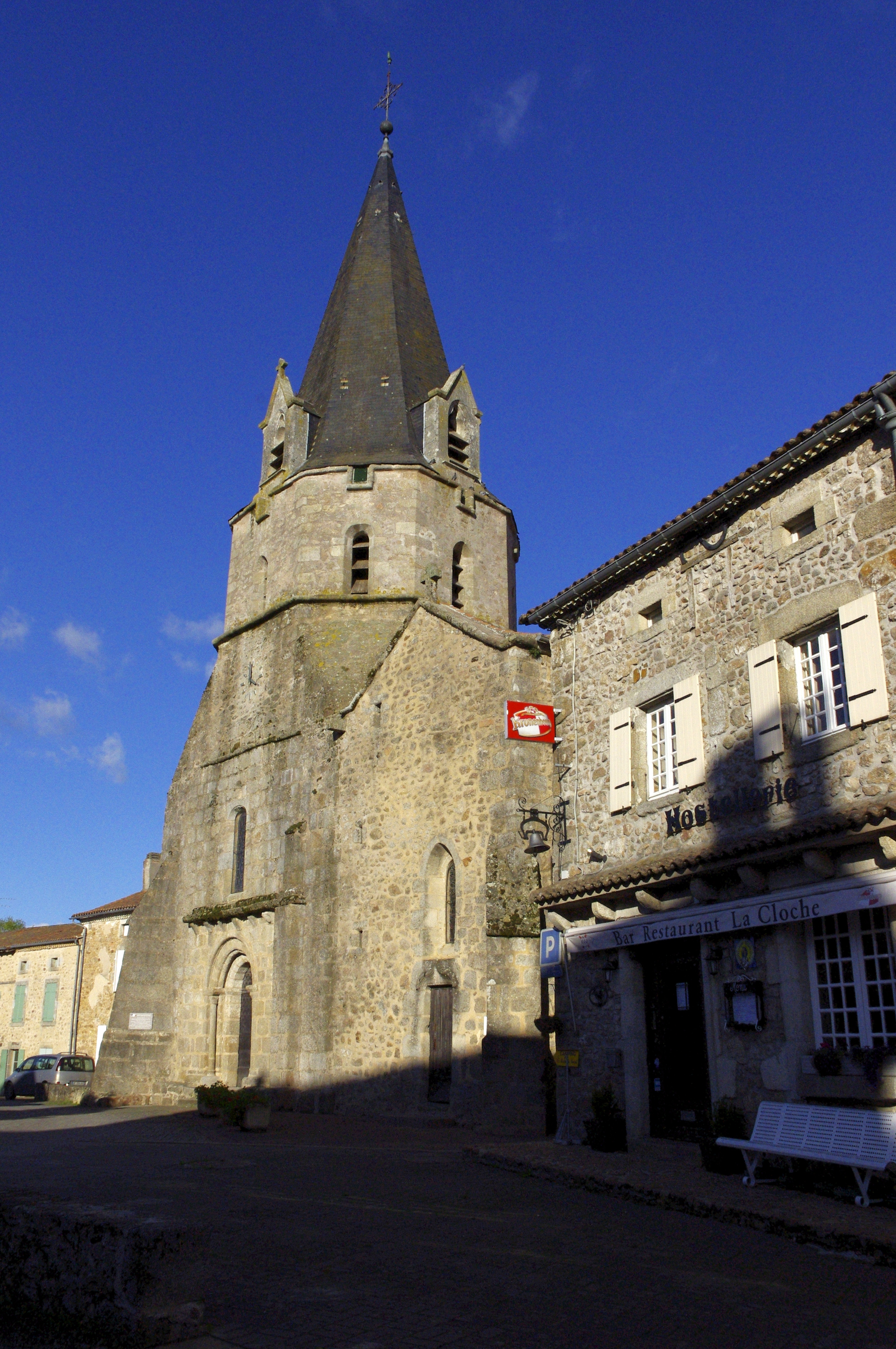 Abjat sur Bandiat et son église